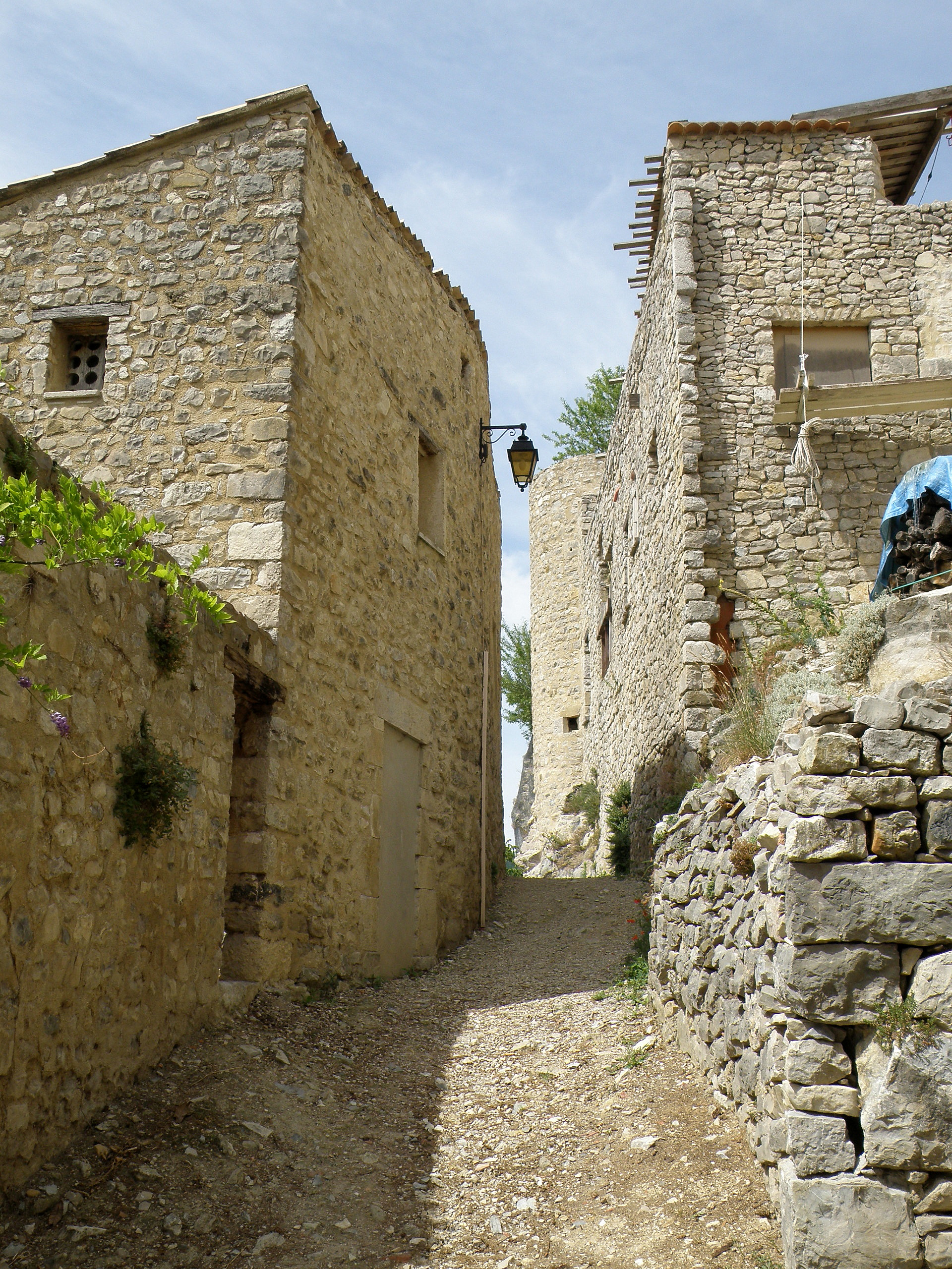 Vercoiran (Drôme, France). Ruelle dans le vieux village perché. Au bout de la ruelle à droite, tour d'angle du château.